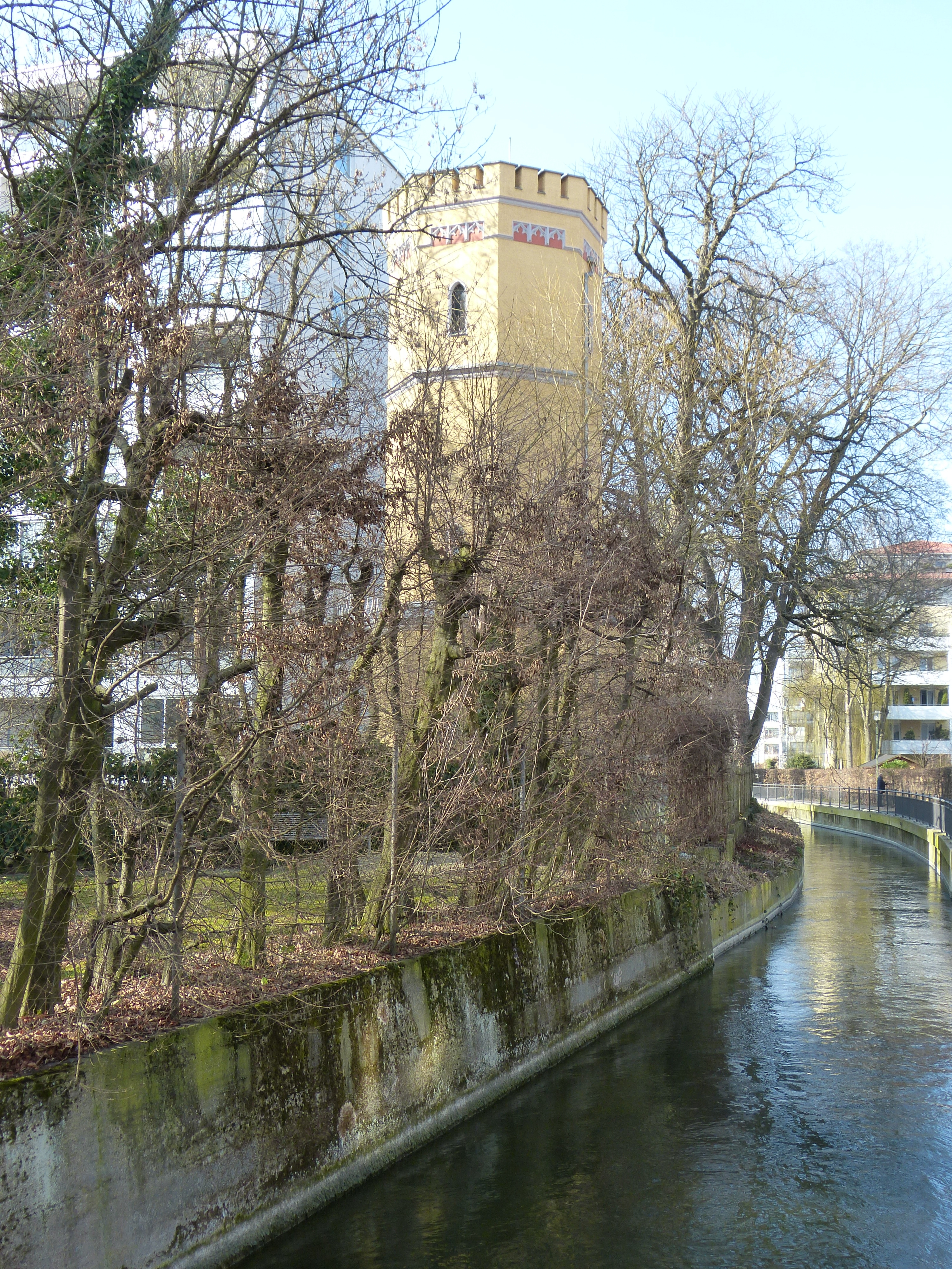 Augsburg, Schwibbogenplatz 2f (ehemals privater Wasserturm zur Bewässerung des Schaur'schen Gartens). Rechts der Sparremlech. This is a photograph of an architectural monument.